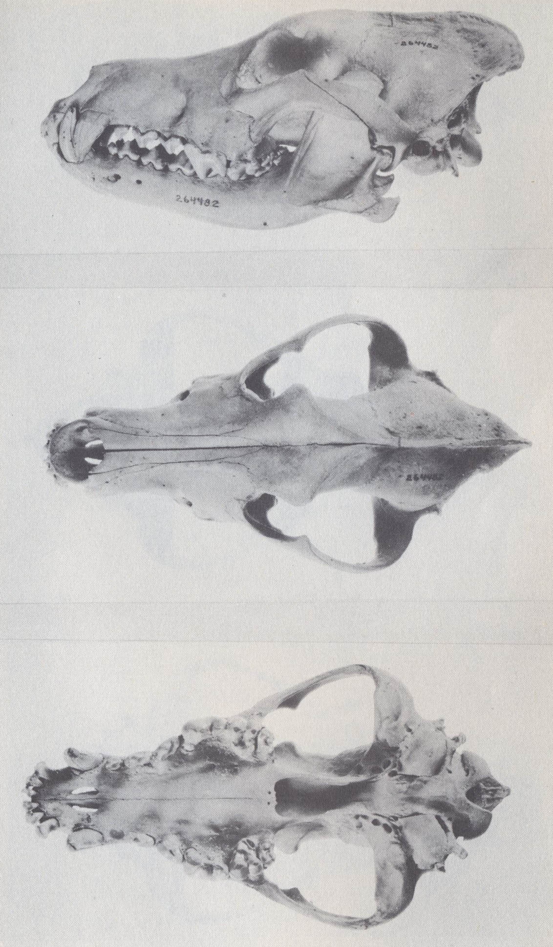 Gray wolf skull.